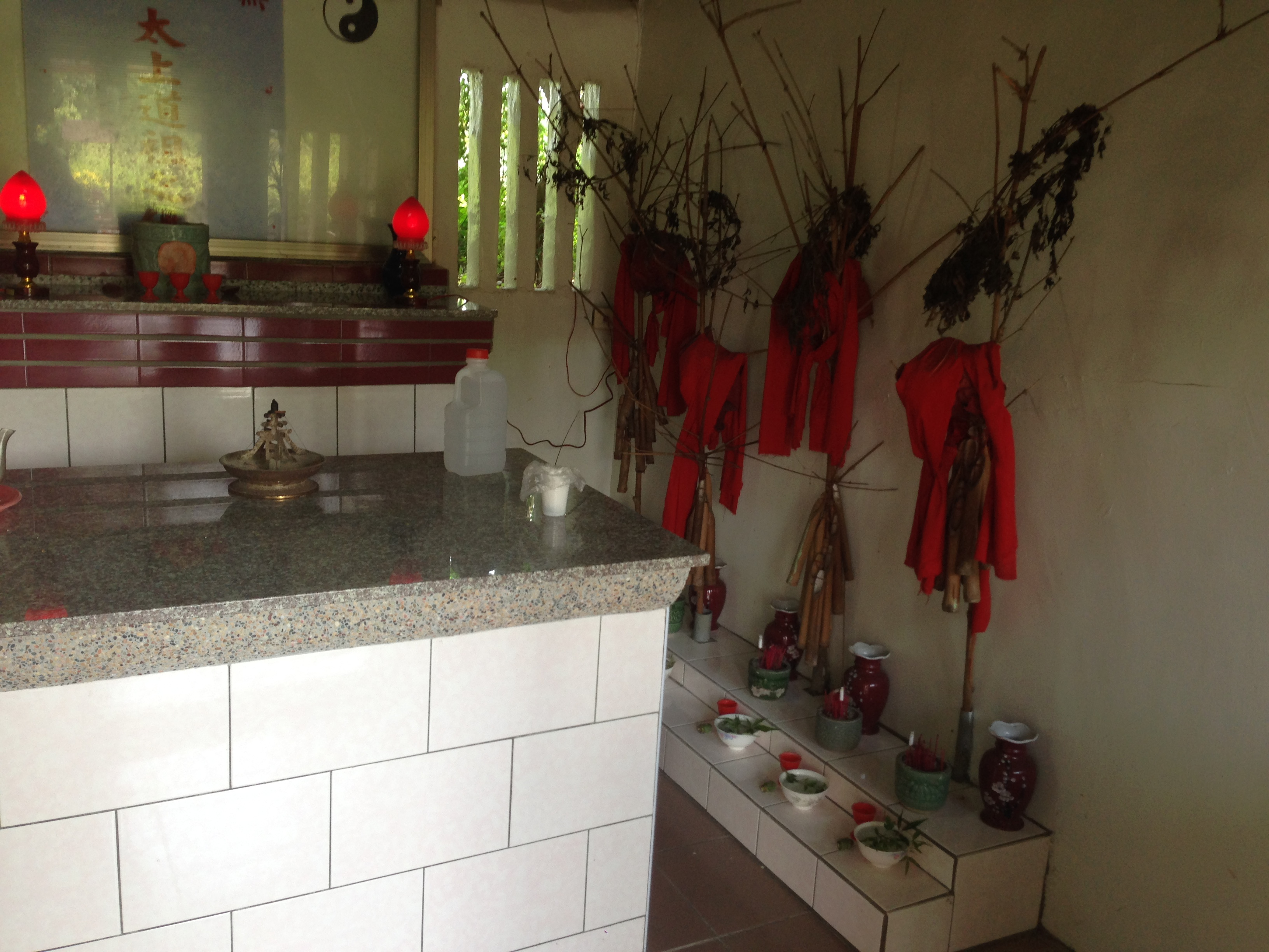 老埤老祖祠祀壺